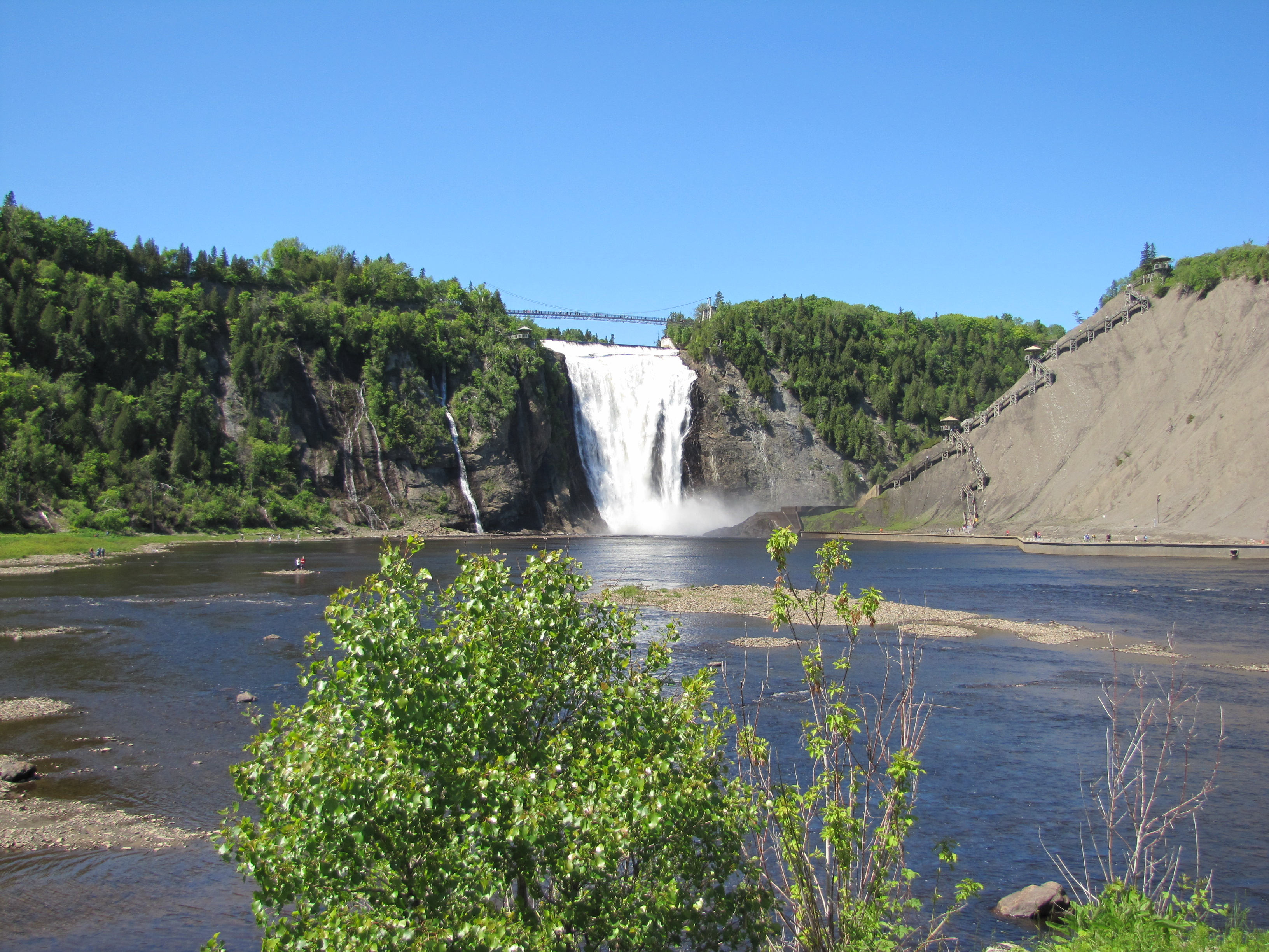 Parc de la Chute-Montmorency